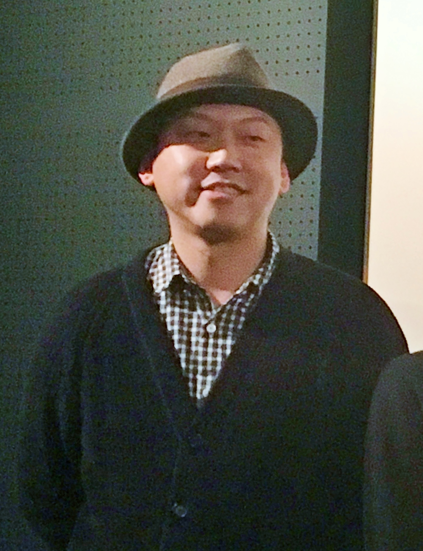 下北沢トリウッドで舞台挨拶を行うSHORT TRIAL PROJECT 2018「アンナとアンリの影送り」監督のYuki Saito（2019年3月17日）